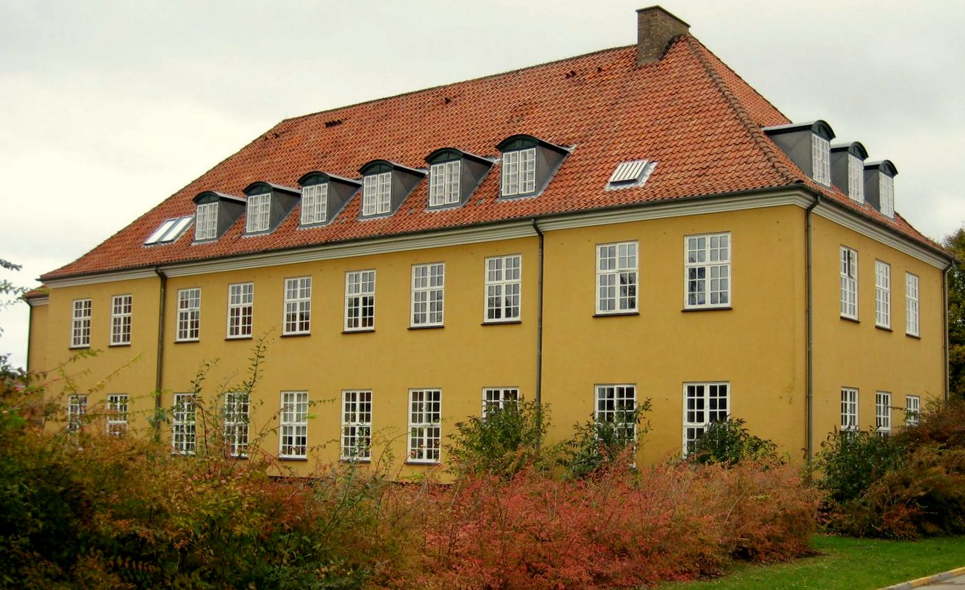 Birkehus